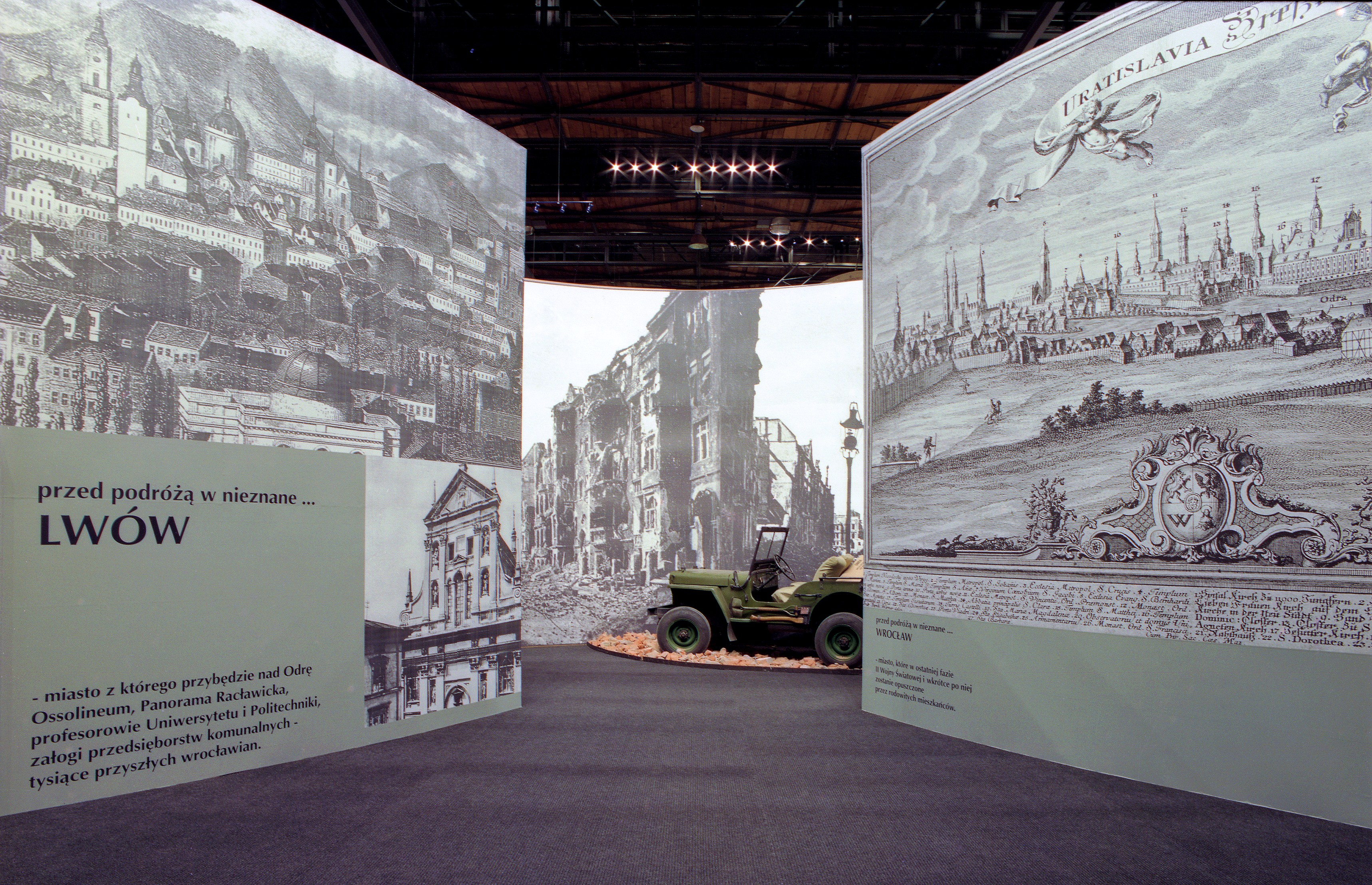 Wystawa „Wrocław 2000” - wejście